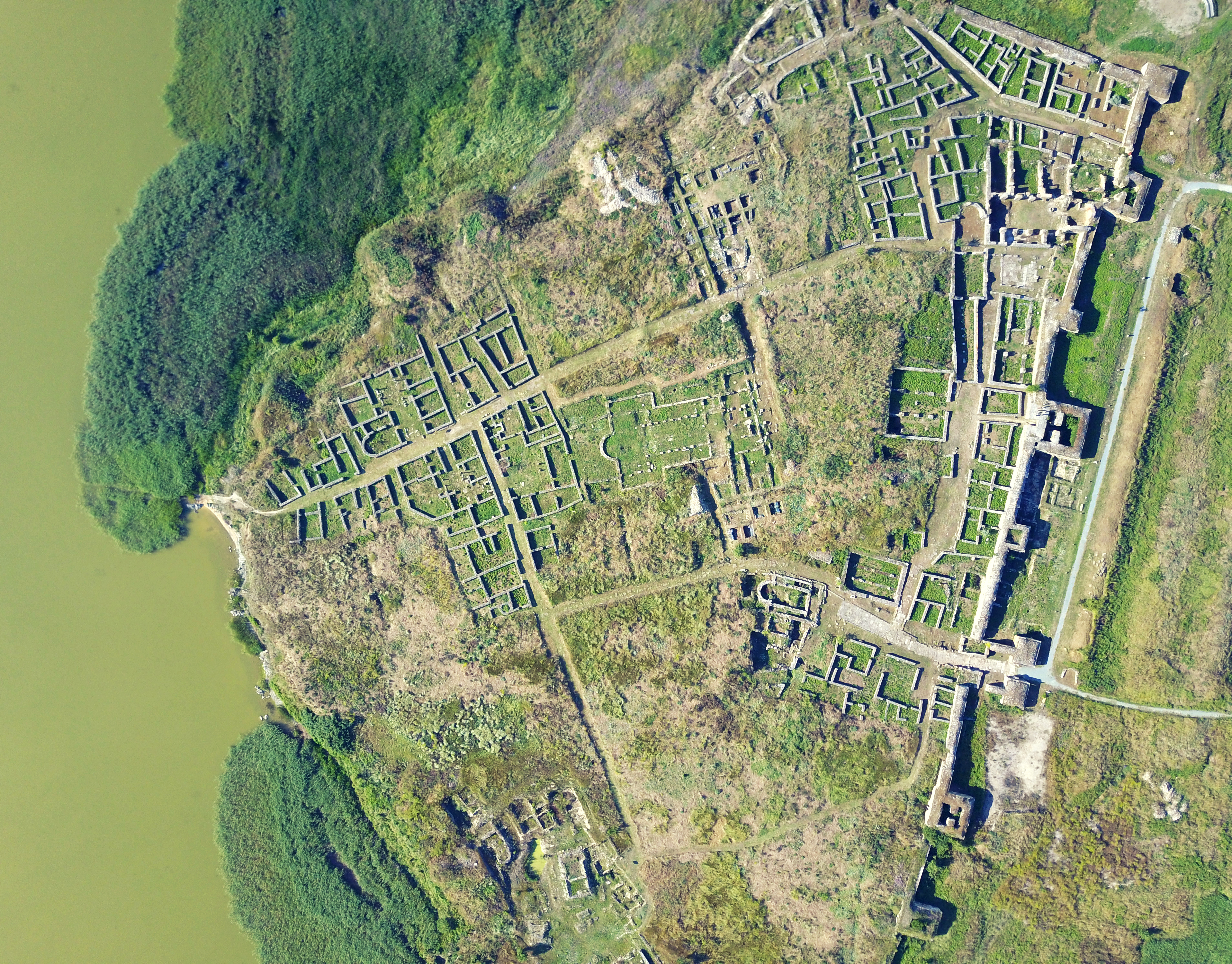 Situl arheologic „Cetatea Histria”